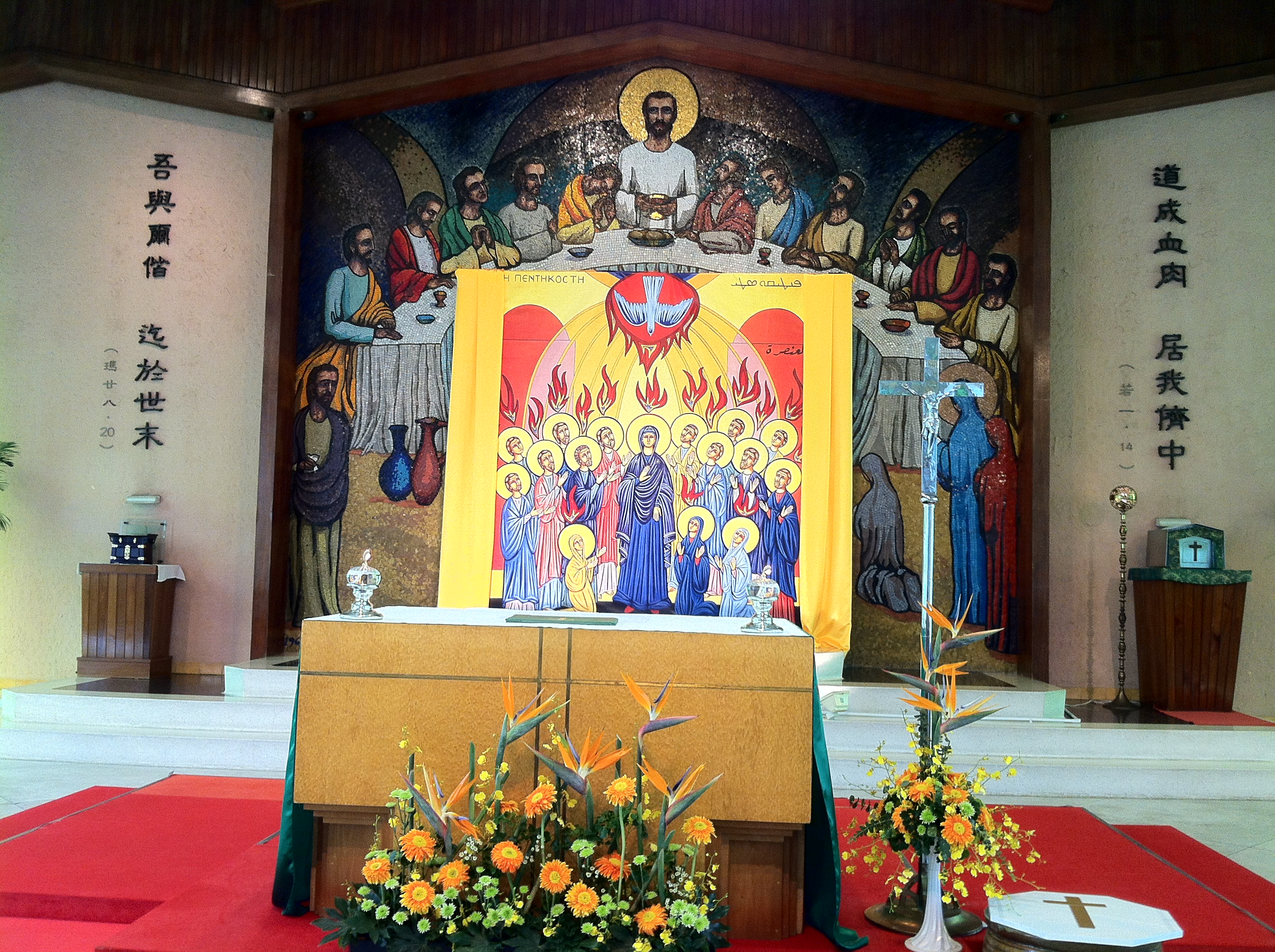 中文（香港）: 善導之母堂, 香港, 中國